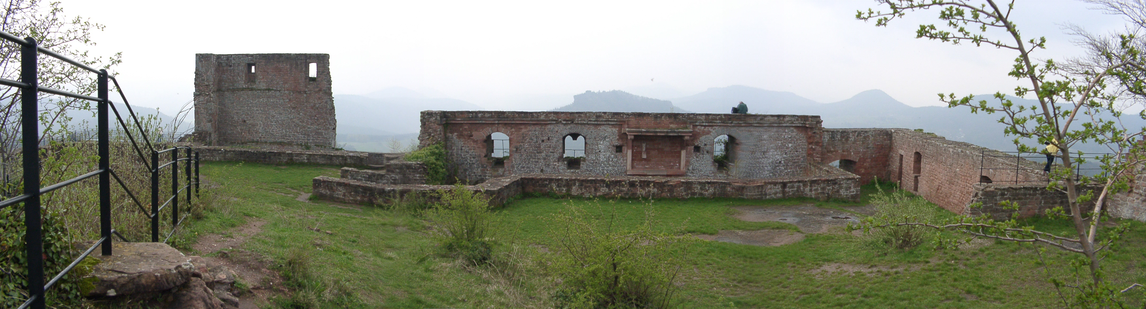 Panorama auf der Burg Lindelbrunn